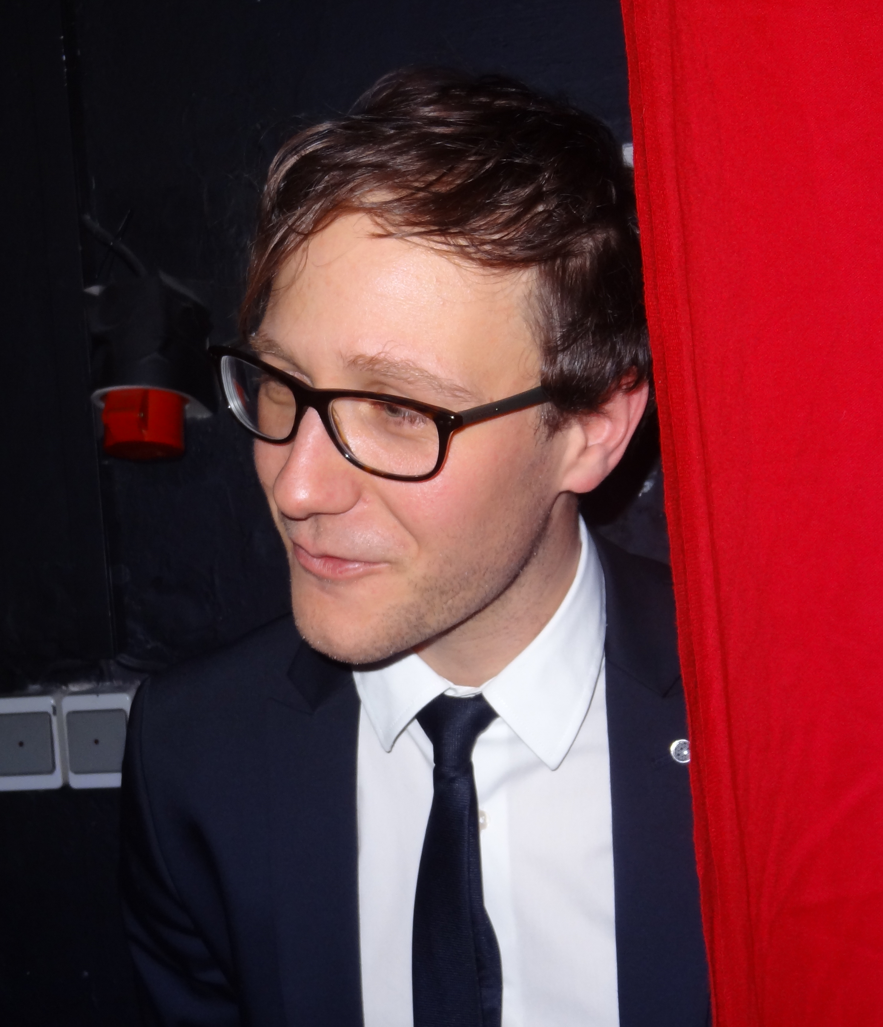 Klemen Slakonja